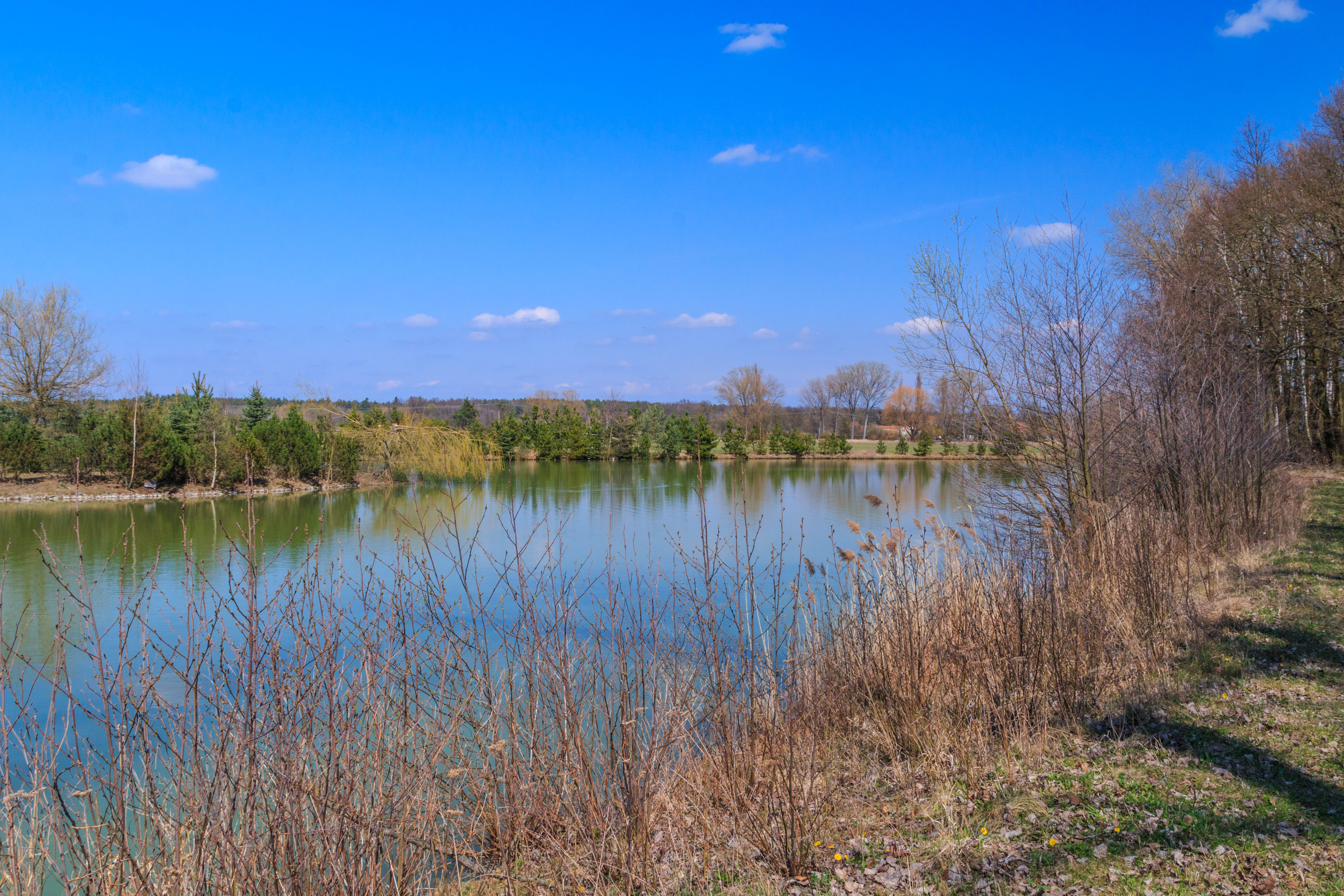 rybník u obce Kolesa Project: Vodstvo.